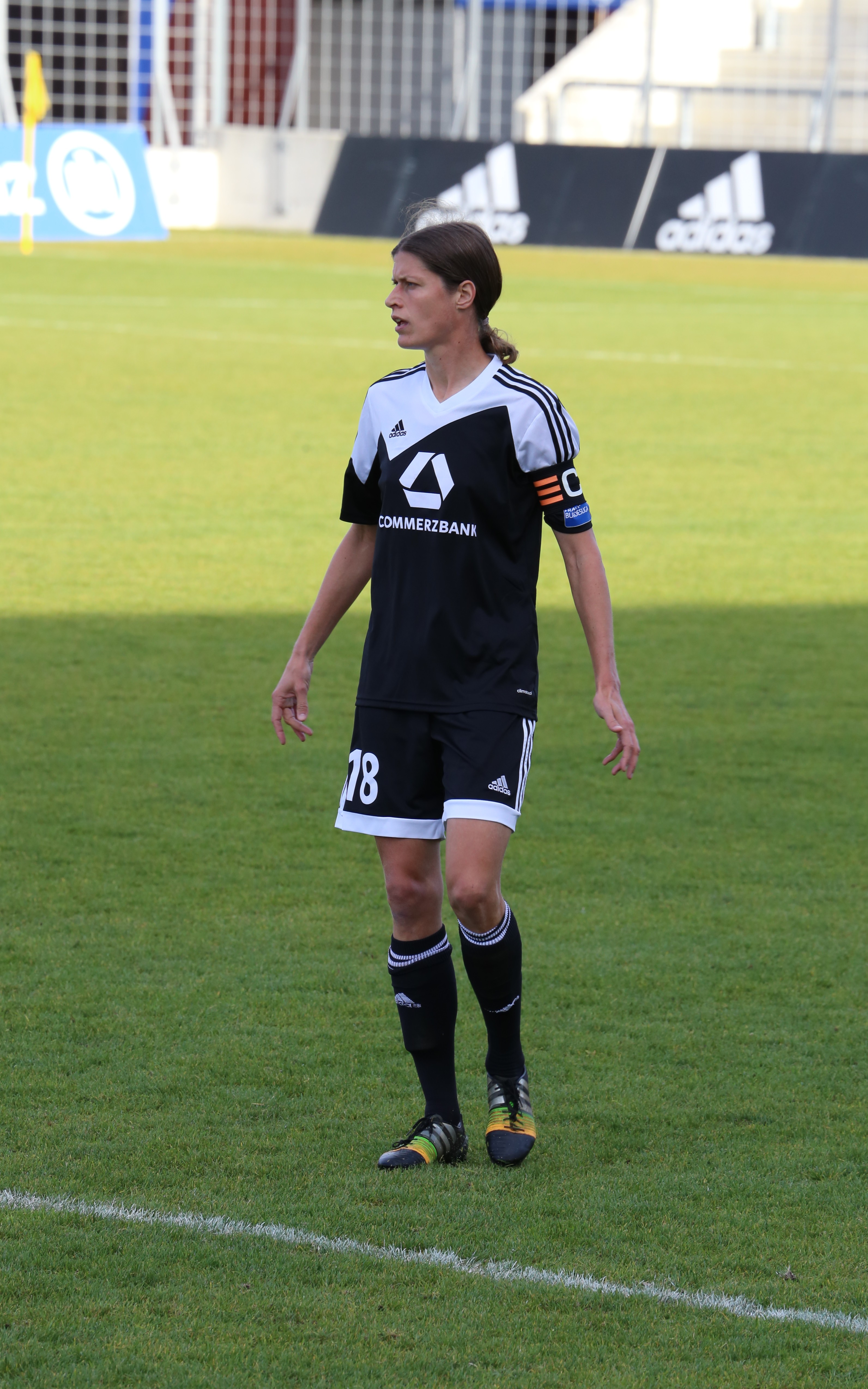 Kerstin Garefrekes (1. FFC Frankfurt) im DFB-Pokal-Achtelfinale zwischen FC Bayern München und 1. FFC Frankfurt, Ergebnis 2:0, Stadion an der Grünwalder Straße